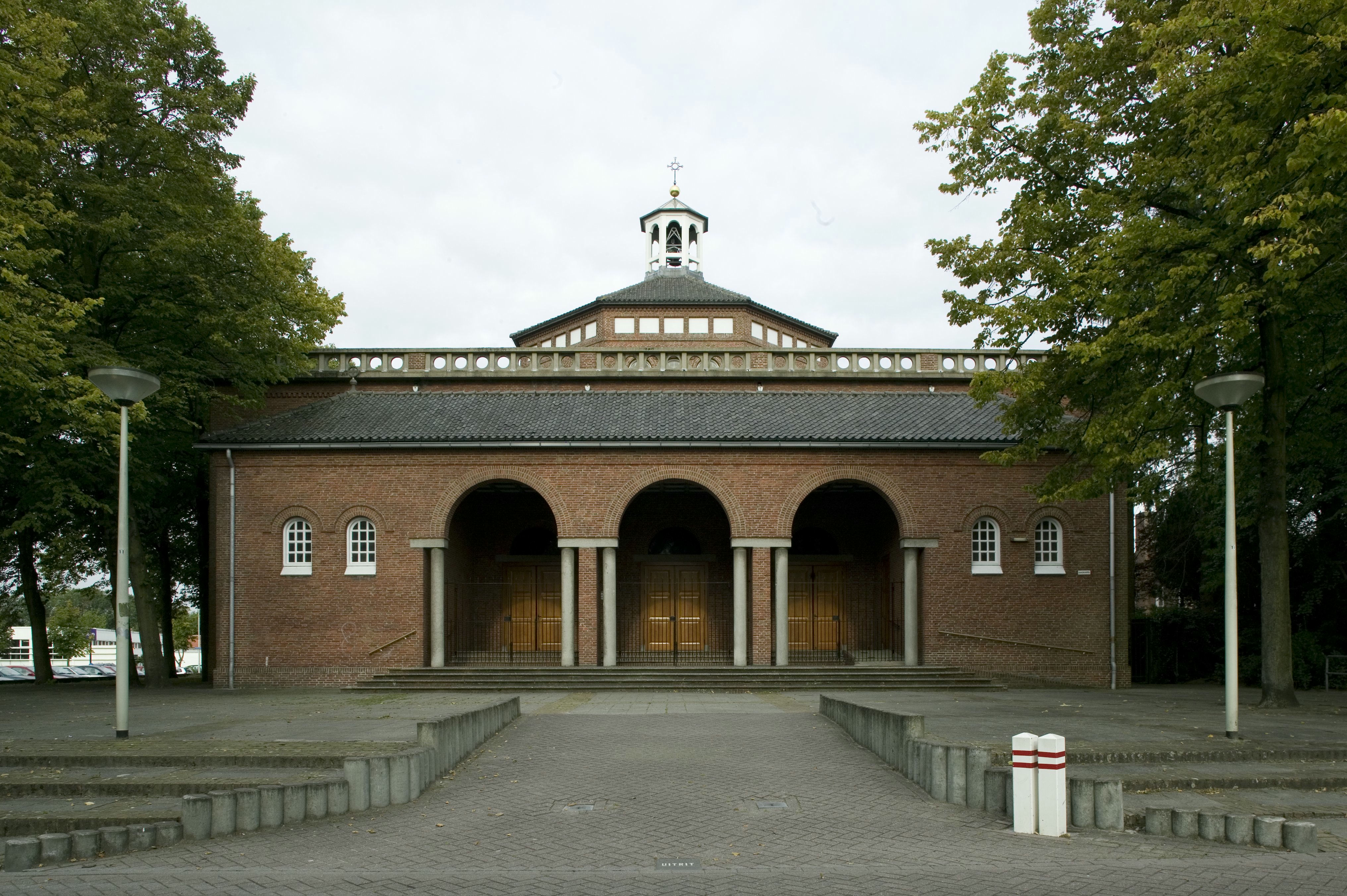 Heilige Hart Van Jezus: Overzicht van de westgevel met voorhal (opmerking: Gefotografeerd voor Monumenten van Herrezen Nederland)